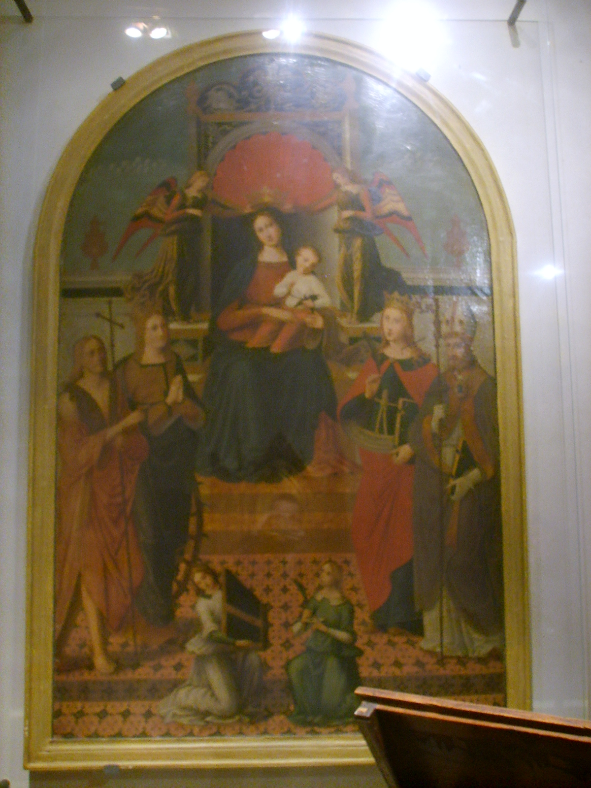 Loggia_del_Bigallo, Alunno_di_Benozzo,_Madonna_con_bambino_angeli_e_santi